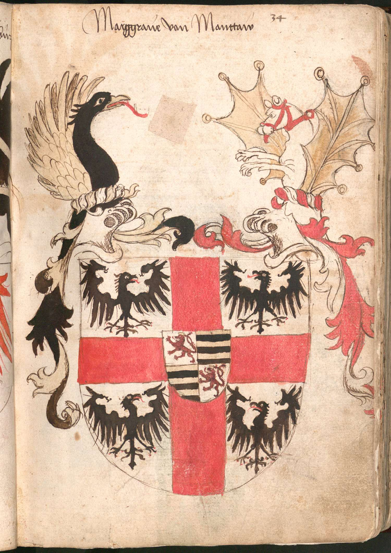 „Wernigeroder (Schaffhausensches) Wappenbuch“; Süddeutschland 4. Viertel 15. Jh. Bayerische Staatsbibliothek München, Cod.icon. 308 n Markgraf von Mantua (Gonzaga)